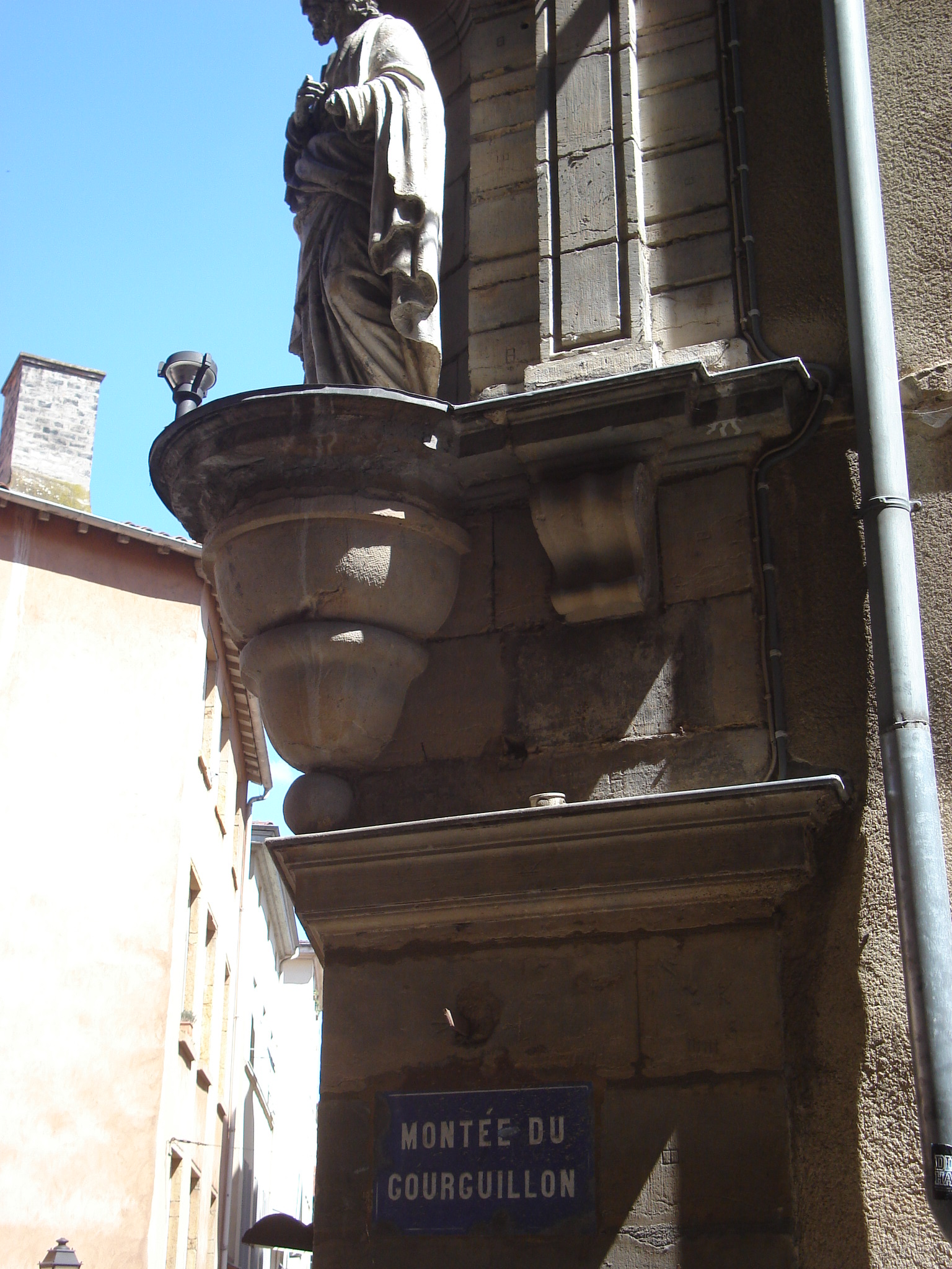 Plaque d'adresse de la montée du Gourguillon